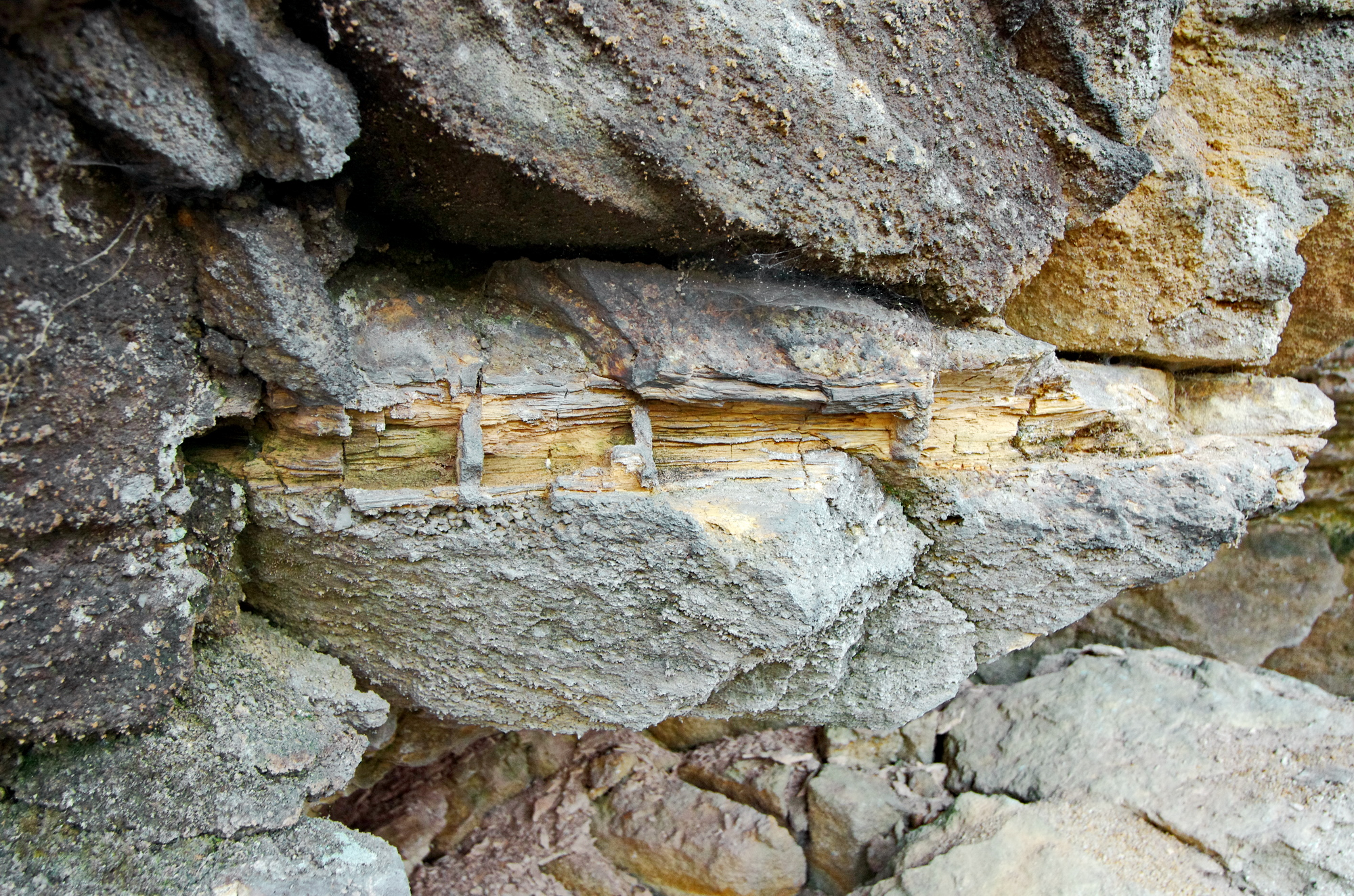 přírodní památka Údolí Ohře, zkamenělý kmen stromu, okres Sokolov